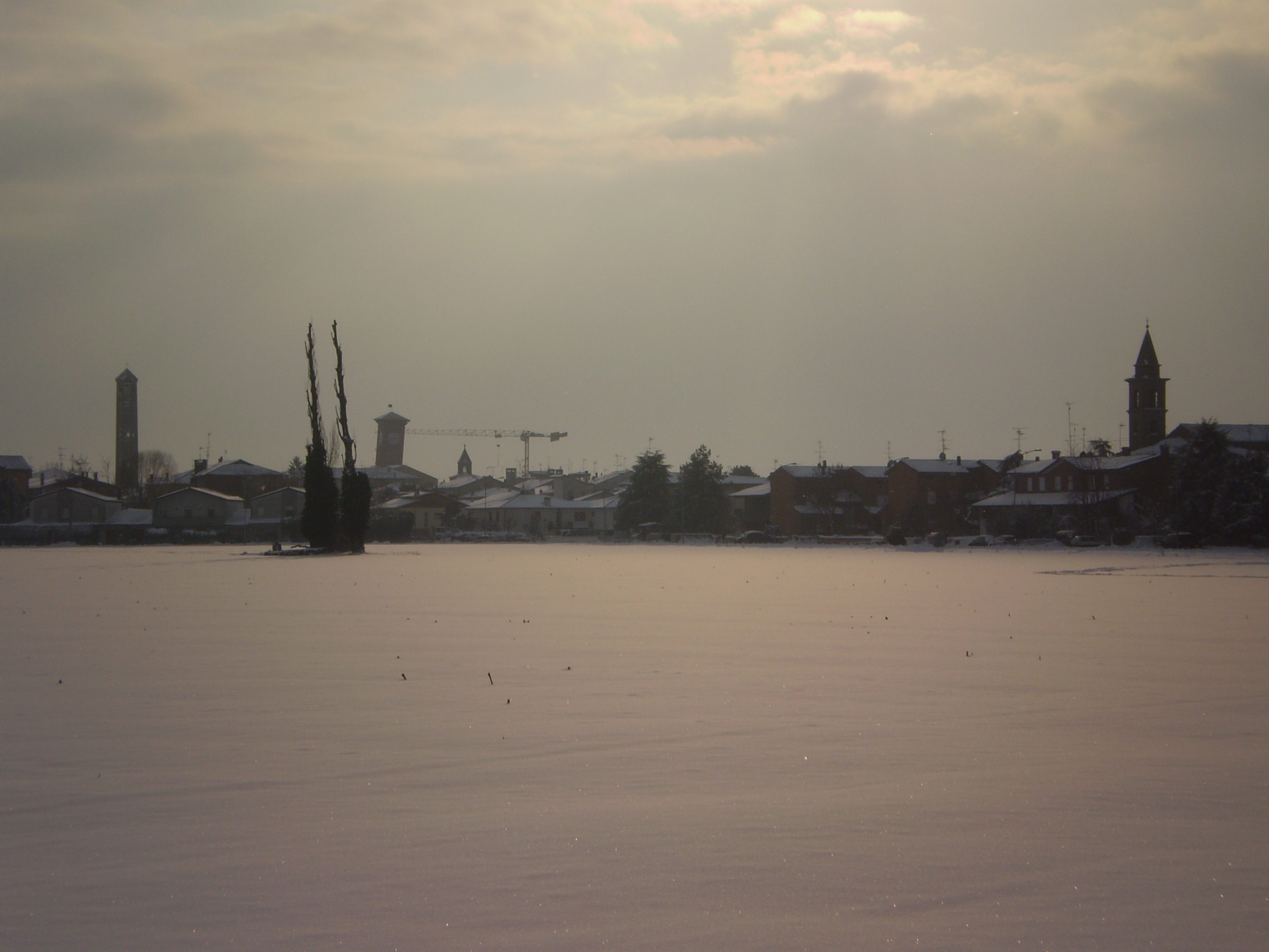 Vista panoramica del centro di Molinella dalla periferia nord